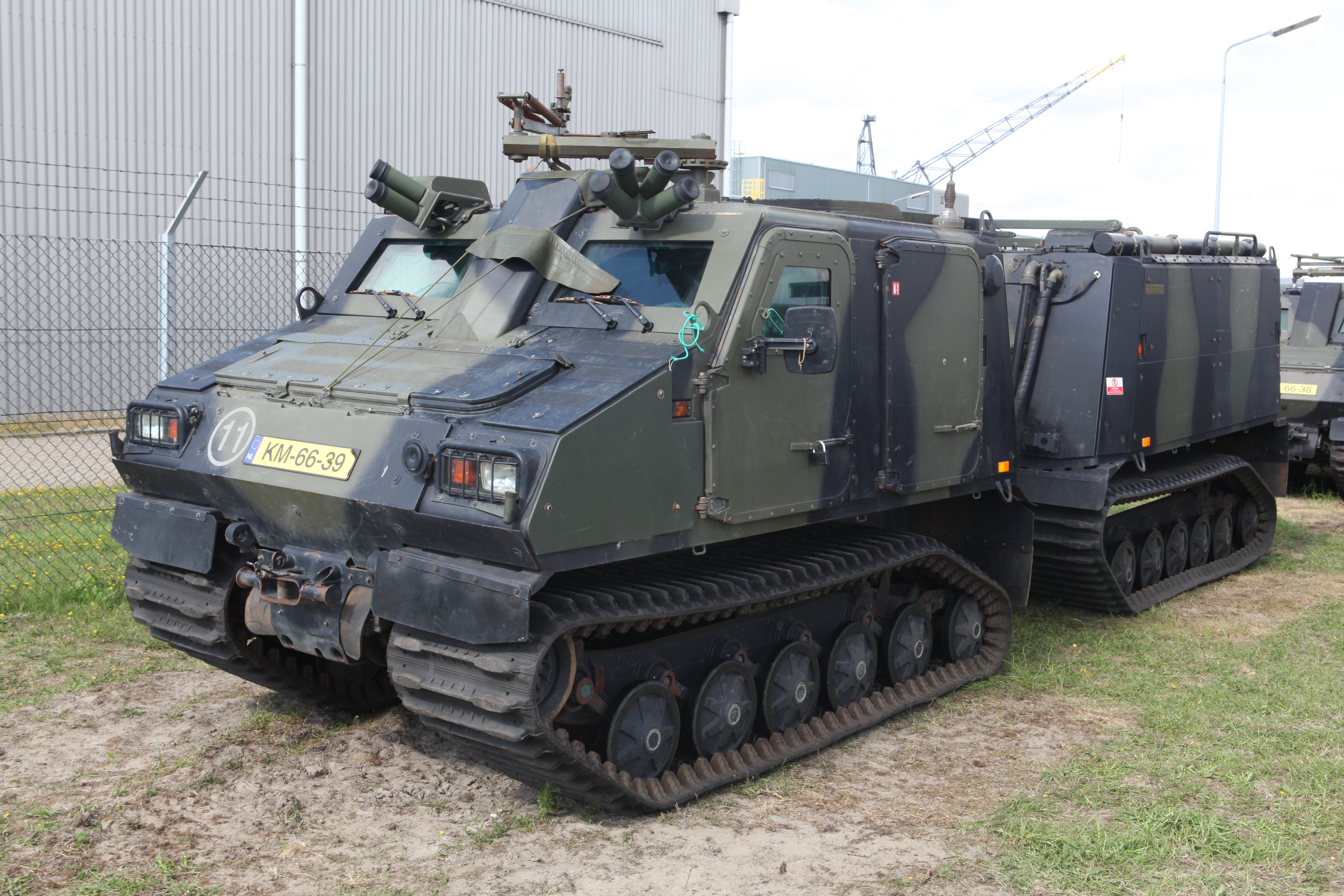 Hägglunds Bandvagn Bv206S Netherlands Marine Corps